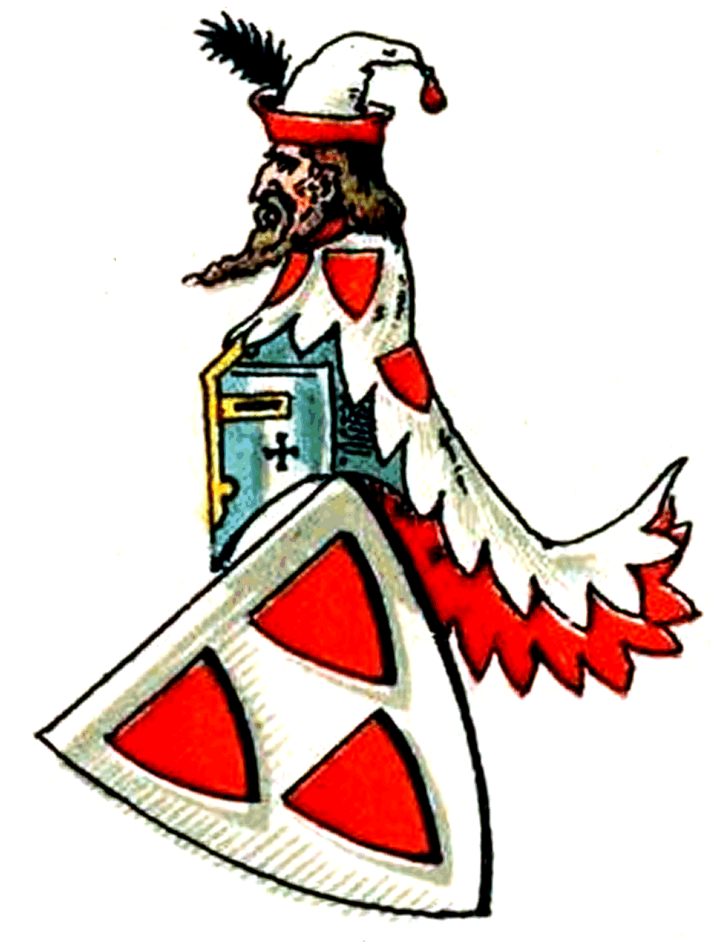 Stammwappen derer von Rappoltstein